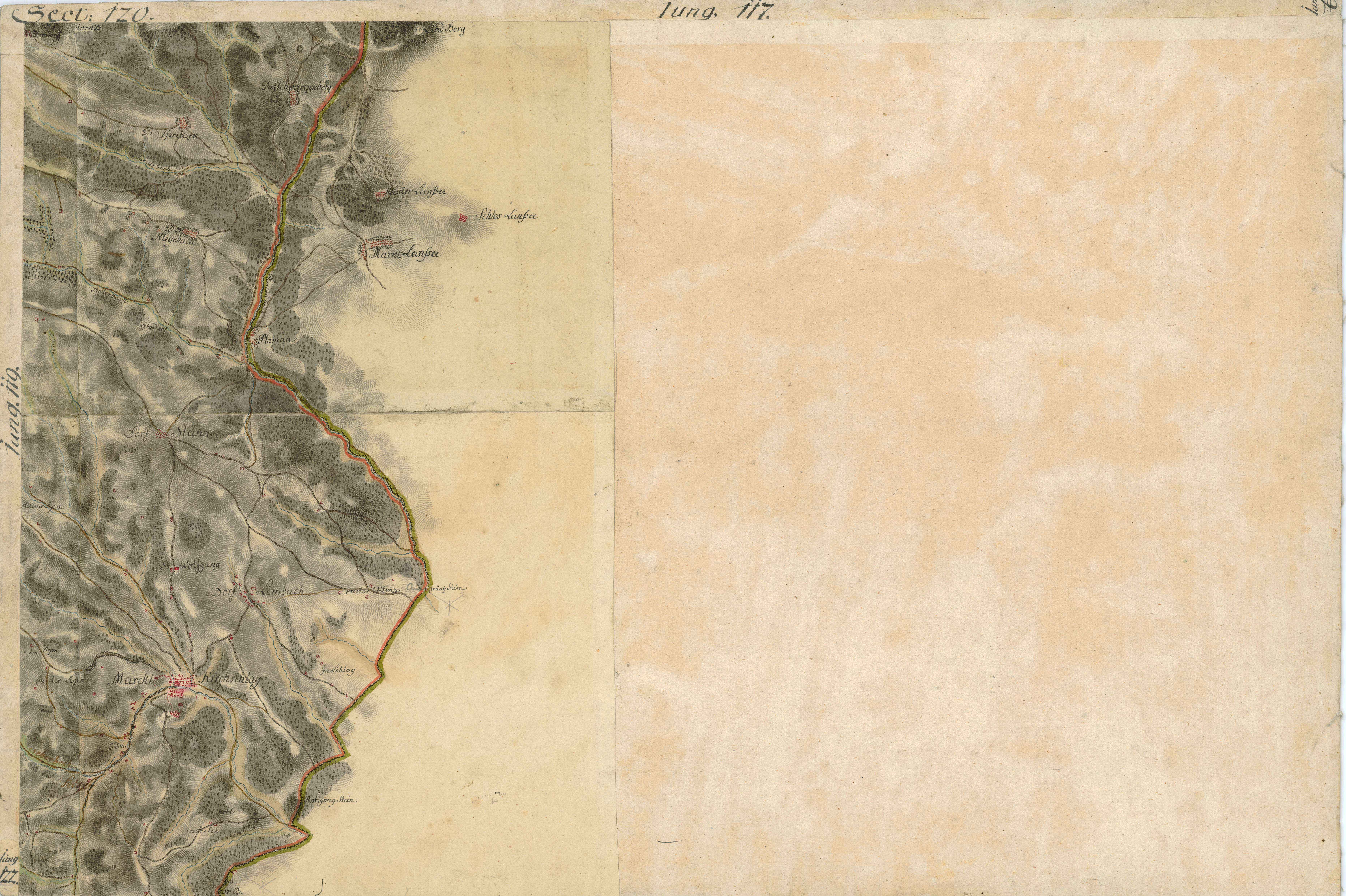 historische Landkarte BIXa242 sect.120 Josephinische Landesaufnahme: Kirchschlag, Wechselgebiet, Niederösterreich, Österreich